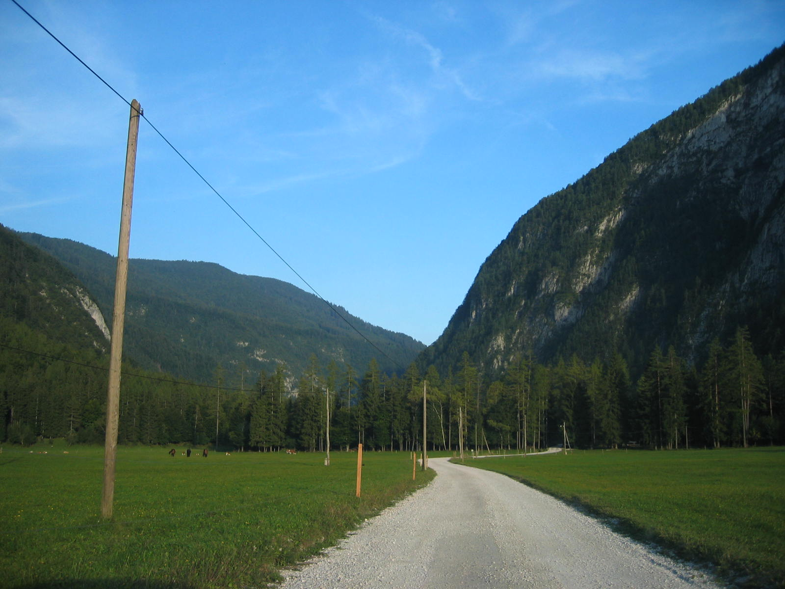 Krma, alpine valley in Slovenia